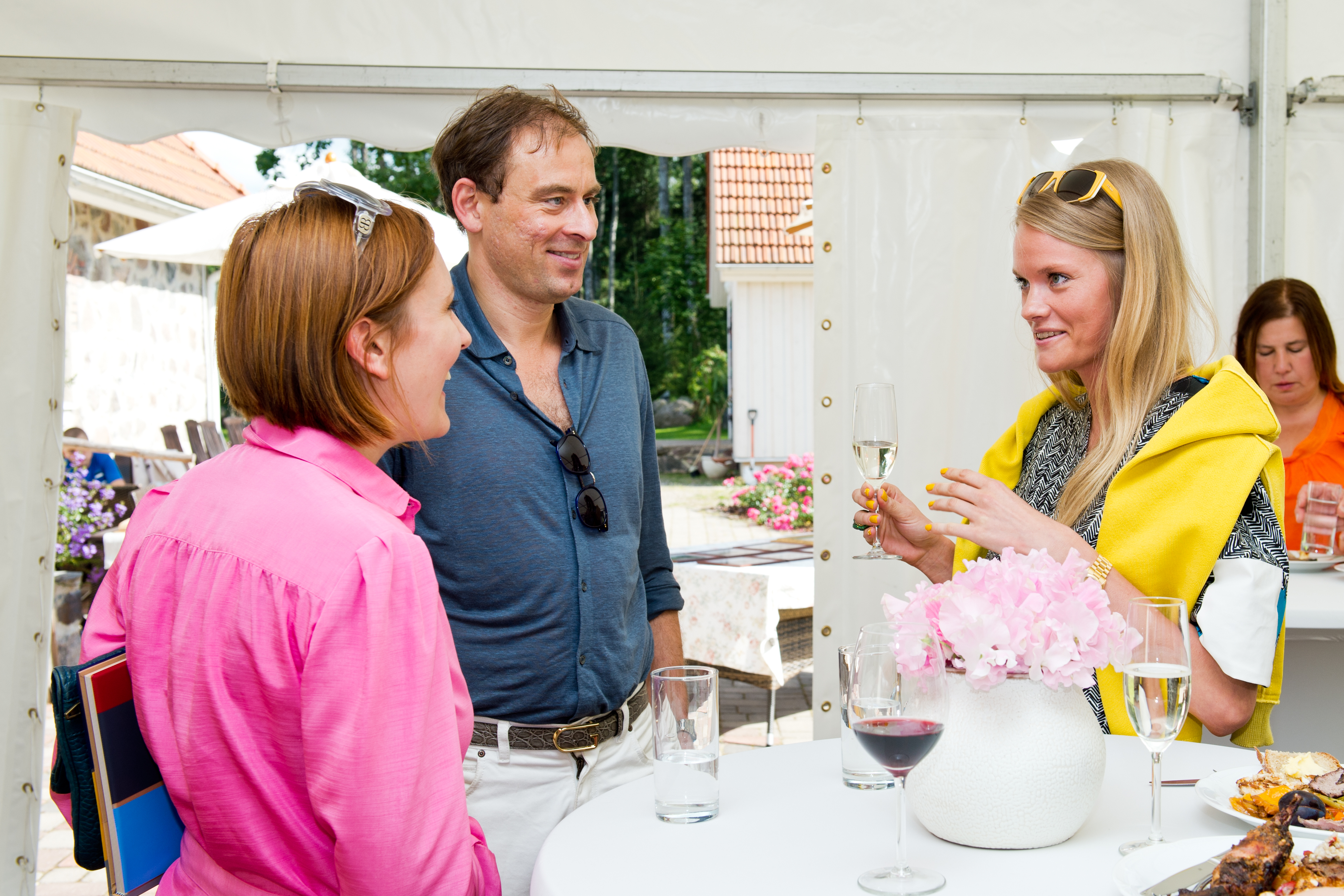 Rain Lõhmus Ärma talus